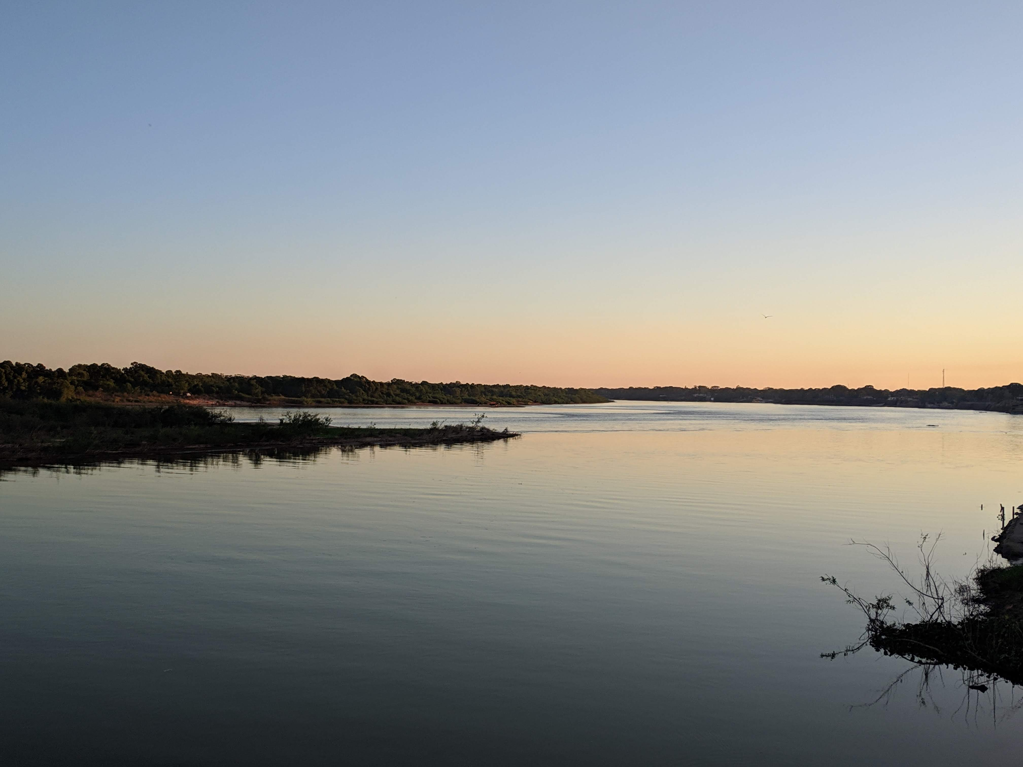 Rio Vermelho encontrando o Rio Araguaia (junho de 2020). Arquivo pessoal.